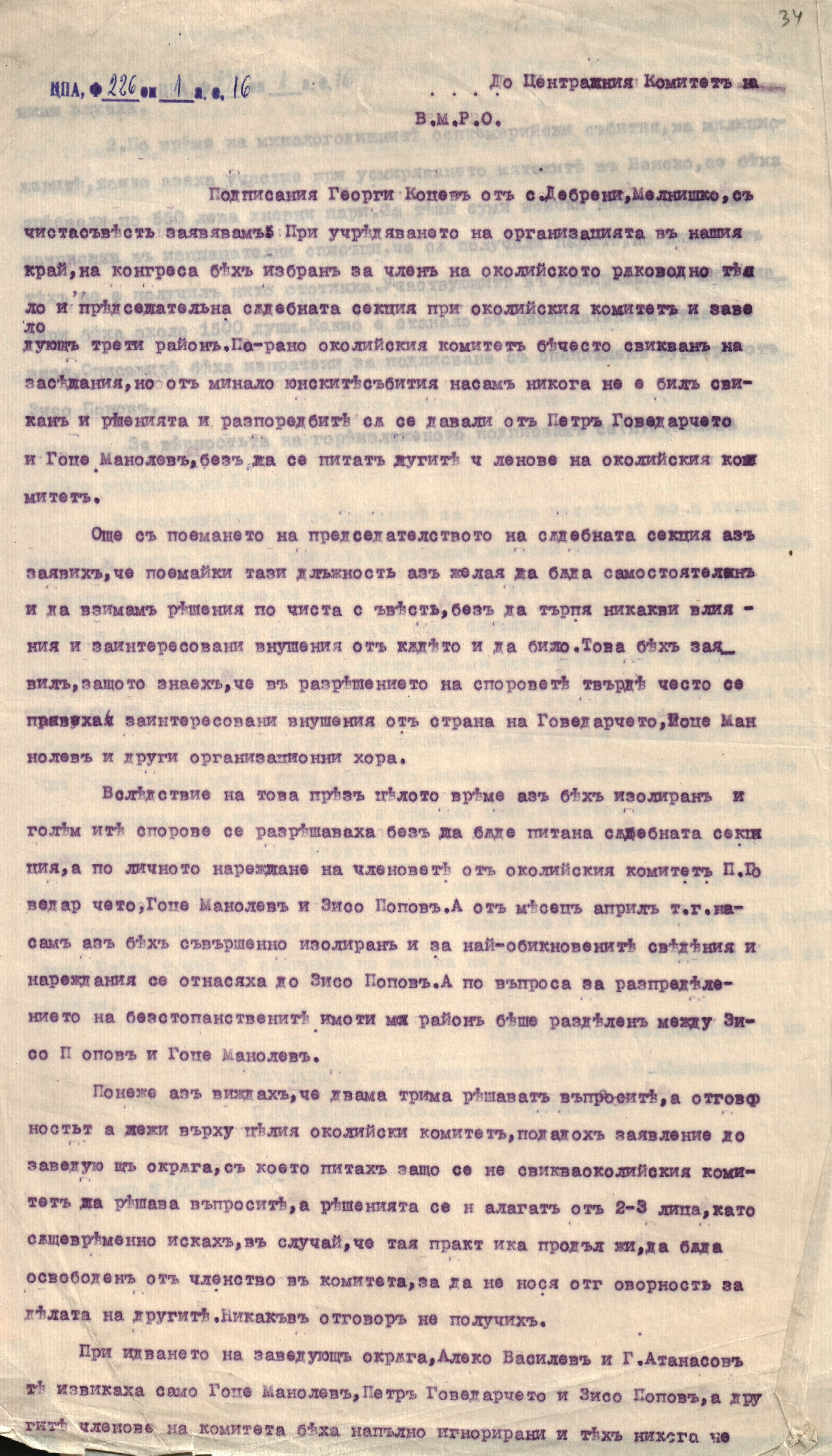 Дознания и изложения на лица от ВМРО по Горнуджумайските събития във връзка с убийството на Тодор Александров.